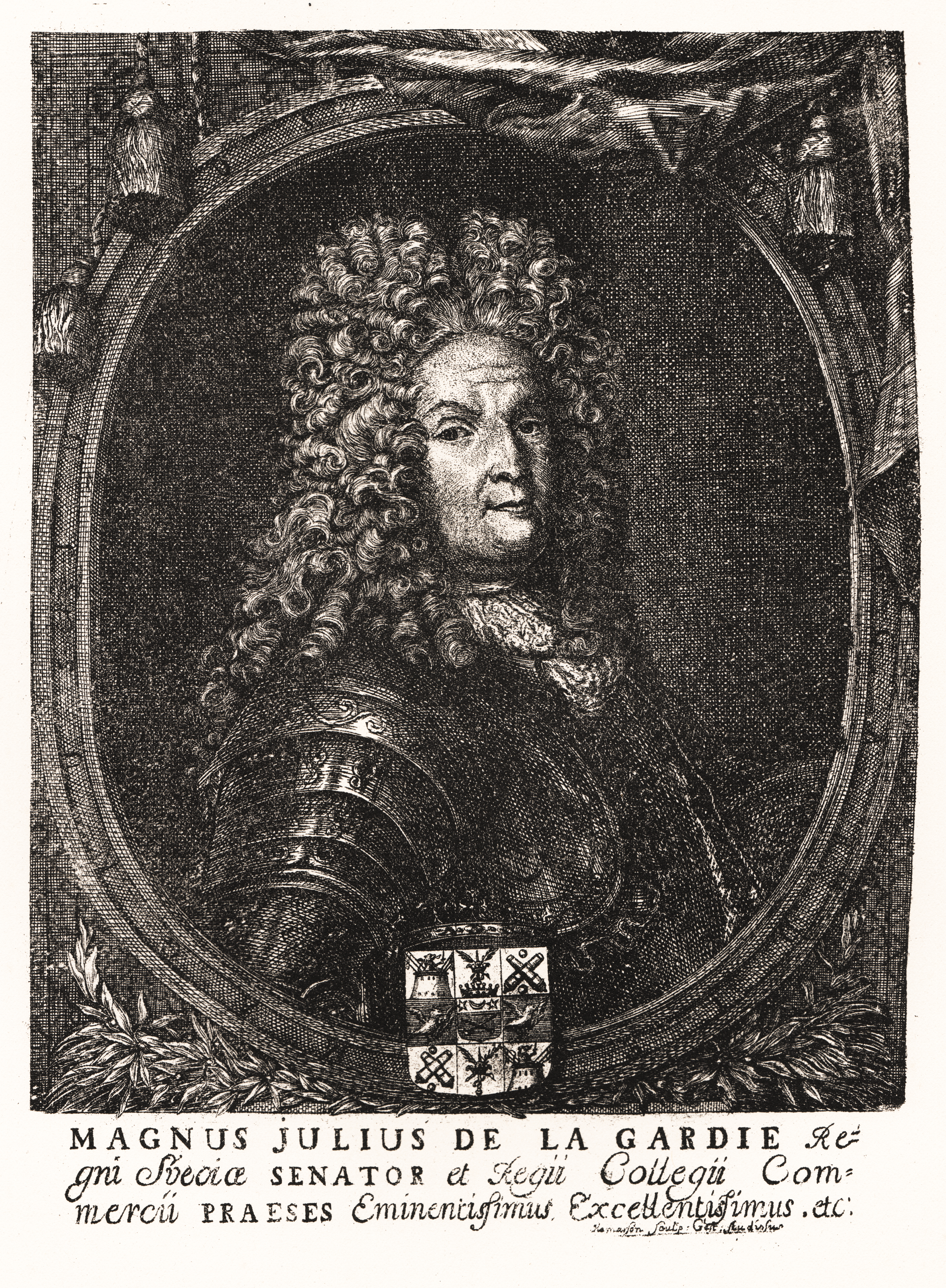 Magnus Julius De la Gardie. Kopparsticket är utfördt af Hamarson efter original, möjligen af Ehrenstrahl eller D. v. Krafft.